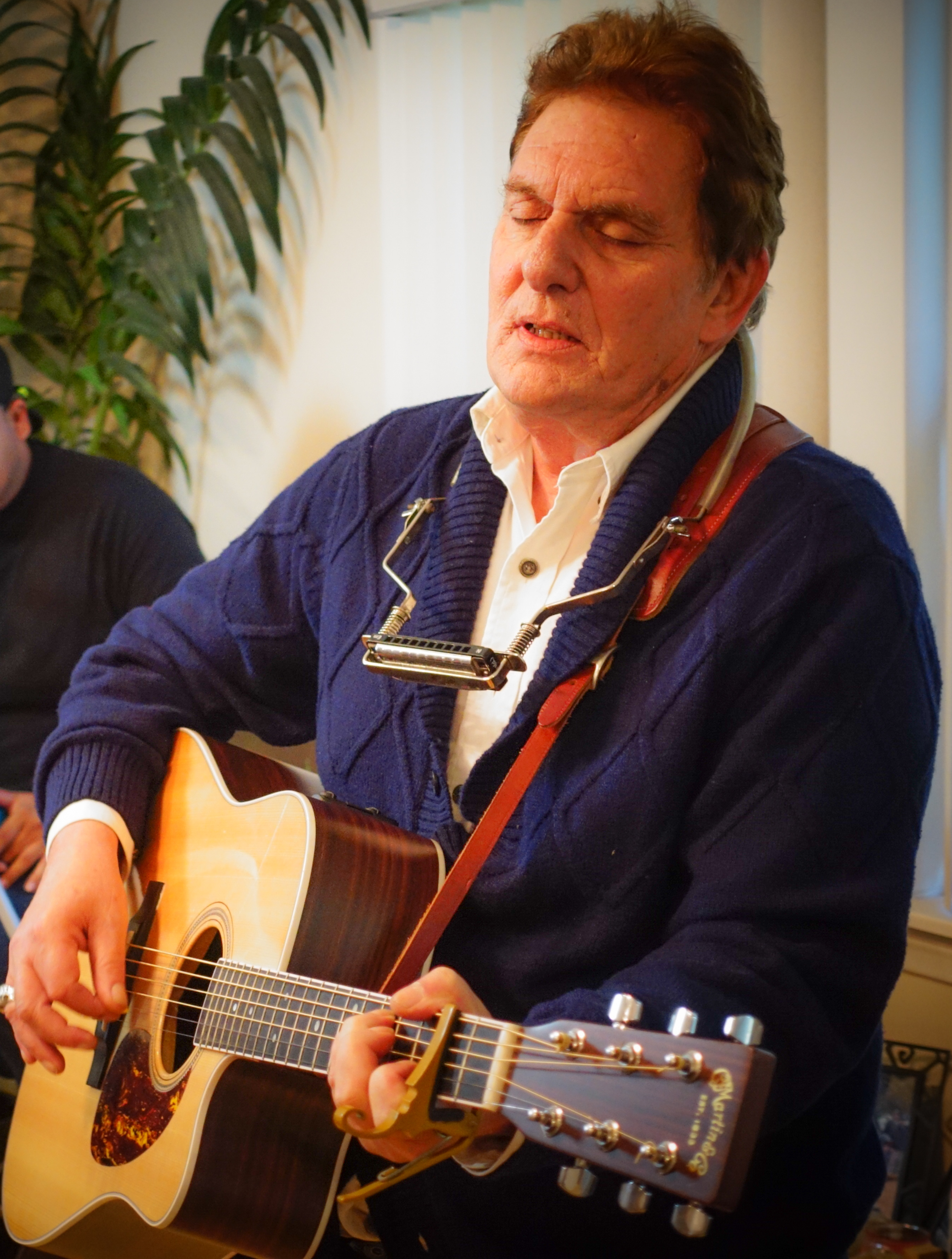 P.F. Sloan